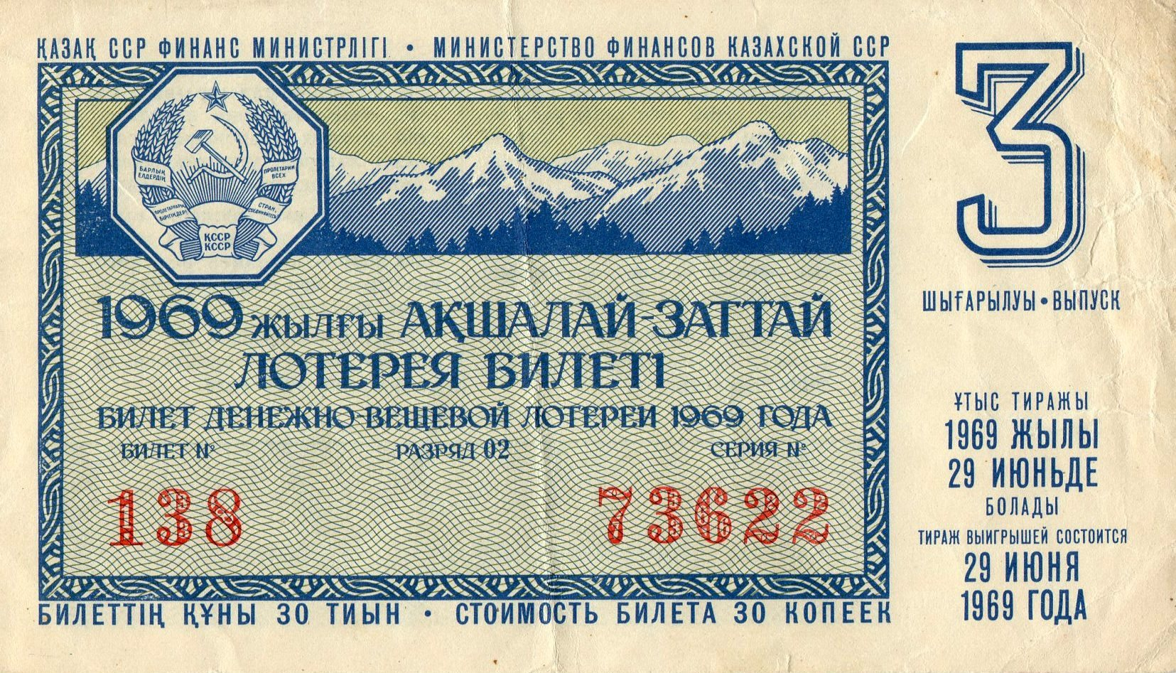 Денежно-вещевая лотерея Казахской ССР. Тираж 29 июня 1969 года